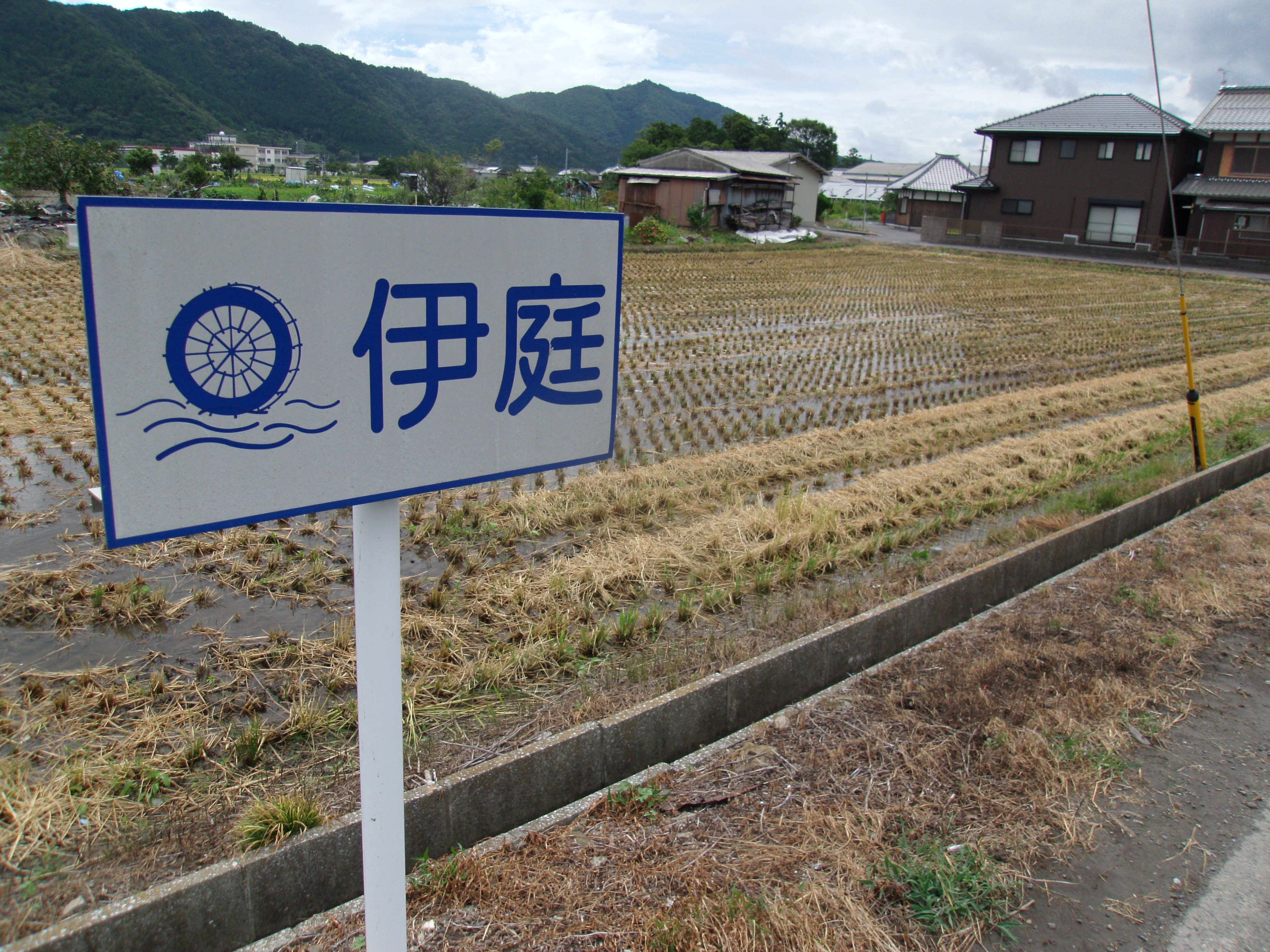 重要文化的景観選定「伊庭内湖の農村景観」。東近江市伊庭町の地区表示板には、水郷を示す水車がシンボルマークとして描かれている。